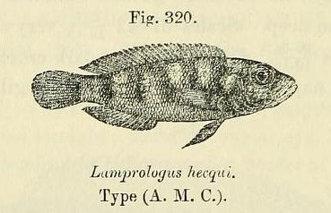 Lepidolamprologus hecqui